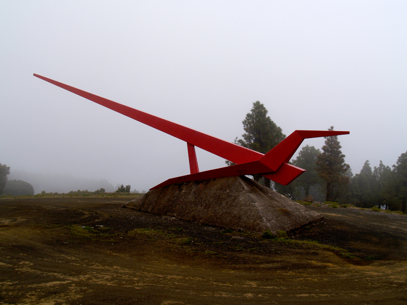 "Homenaje al Campesino", Obra del escultor Tony Gallardo, realizada en 1976